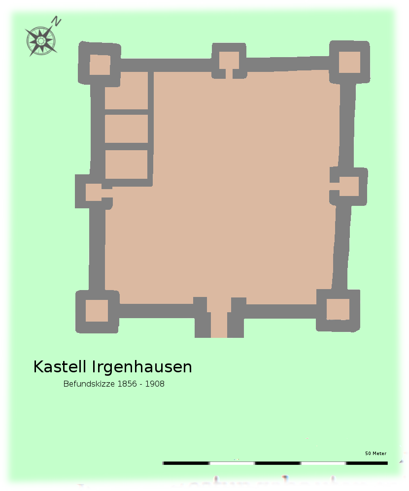 Befundskizze des spätrömischen Kastell Irgenhausen, Schweiz.